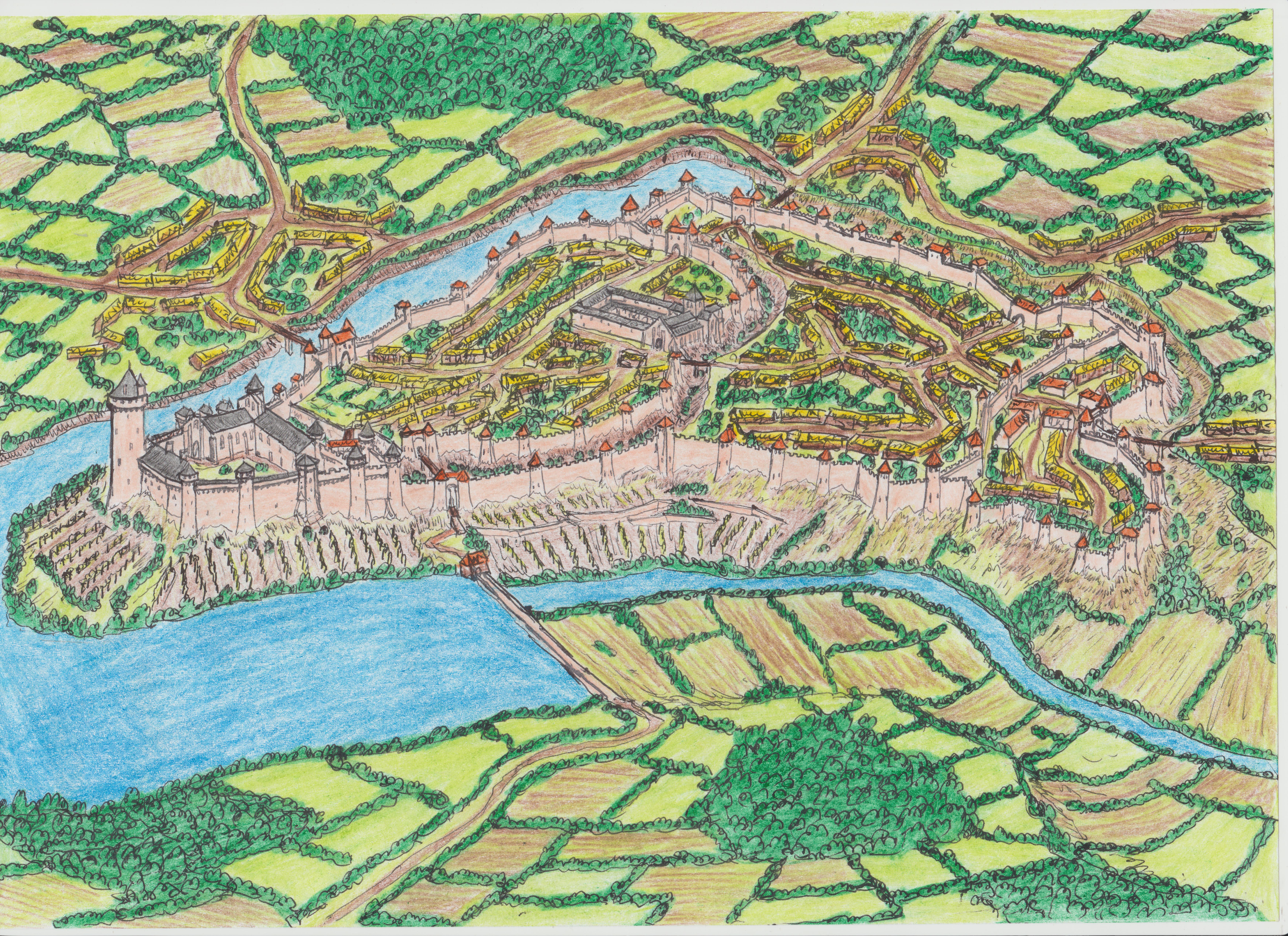 Dessin montrant une vue aérienne hypothétique de la ville fortifiée de Mortagne sur Sèvre vers le XIVe siècle.